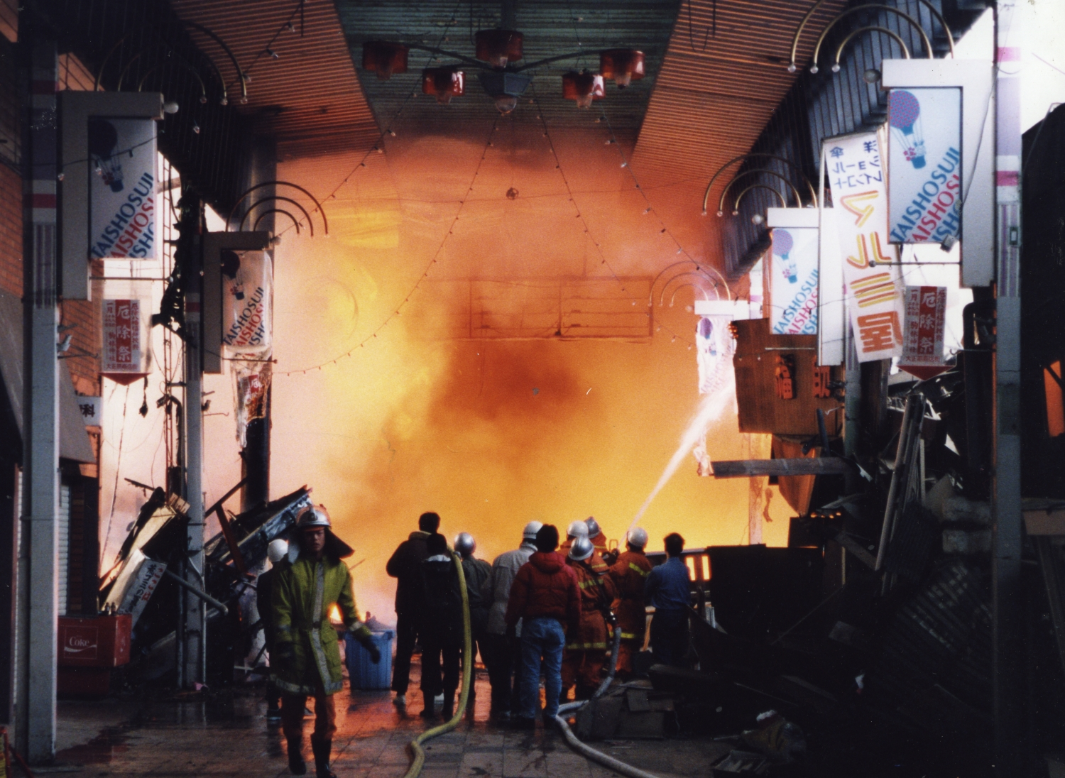 二葉5・6大正筋（1995年1月）